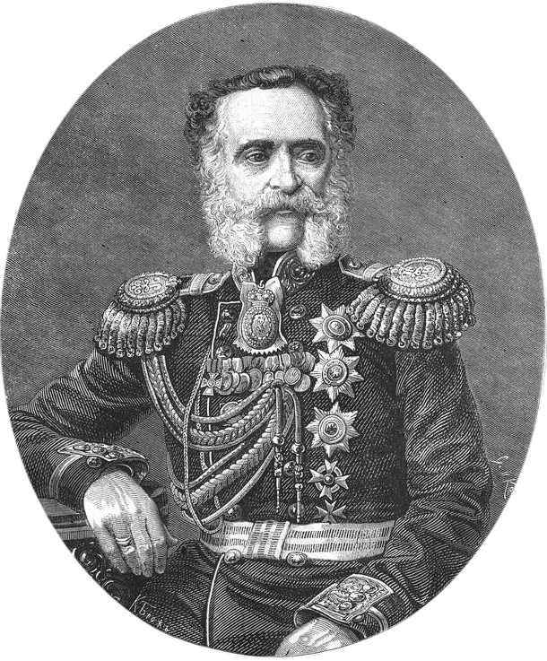 Граф Владимир Фёдорович Адлерберг 1-й (1791—1884) — приближённый Николая I, генерал от инфантерии, генерал-адъютант, в 1852-70 годах — министр двора и уделов. Брат статс-дамы Ю. Ф. Барановой: имя при рождении: Эдуард Фердинанд Вольдемар фон Адлерберг, или Эдвард Фердинанд Вольдемар Адлерберг нем.: Eduard Ferdinand Woldemar von Adlerberg швед.: Edvard Ferdinand Voldemar Adlerberg py-aнгл. pоманизатция: Graf Vladimir Fyodorovich Adleberg I